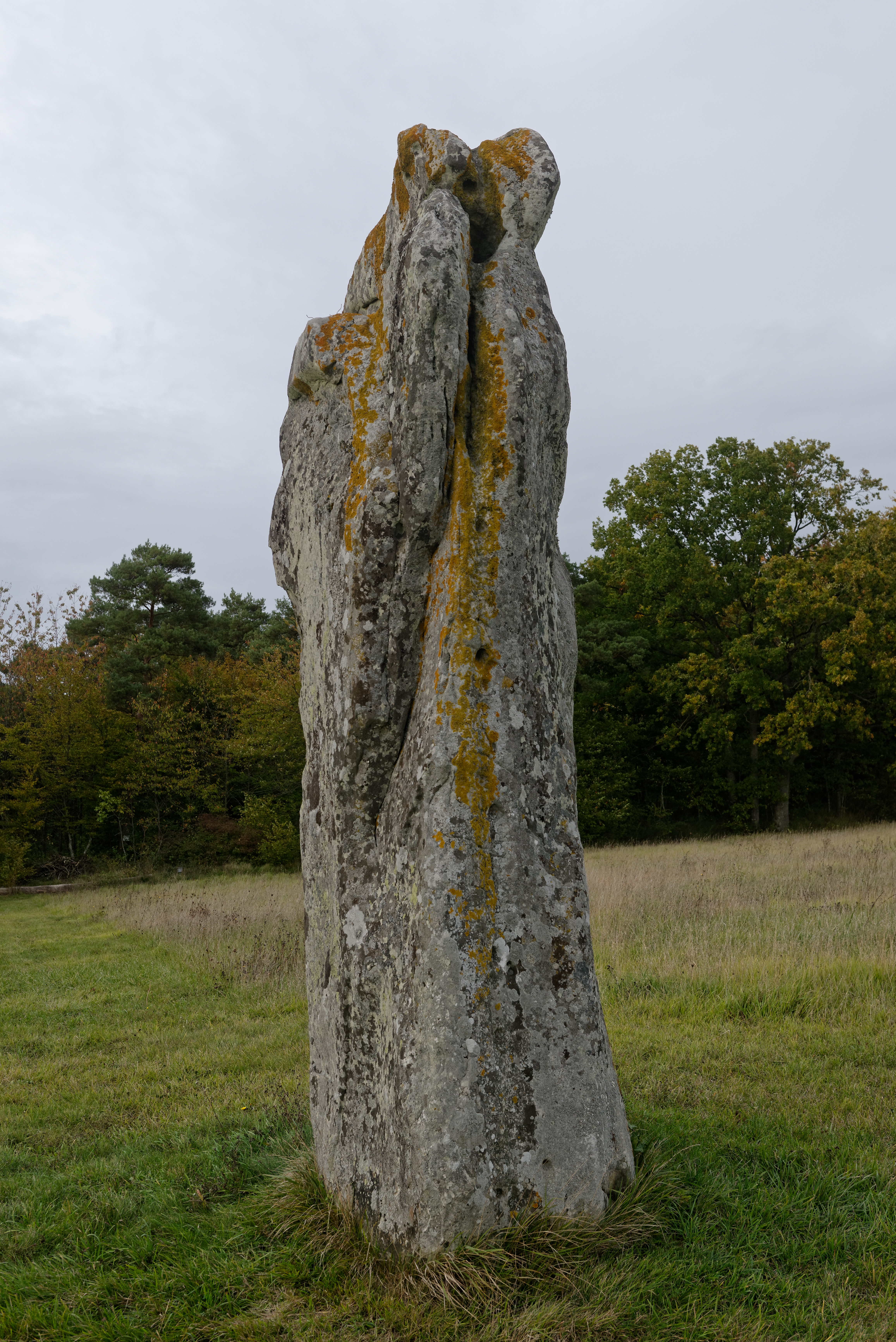 Face sud du menhir dit de la Pierre aux Couteaux à Diant en Seine-et-Marne, région Île-de-France.